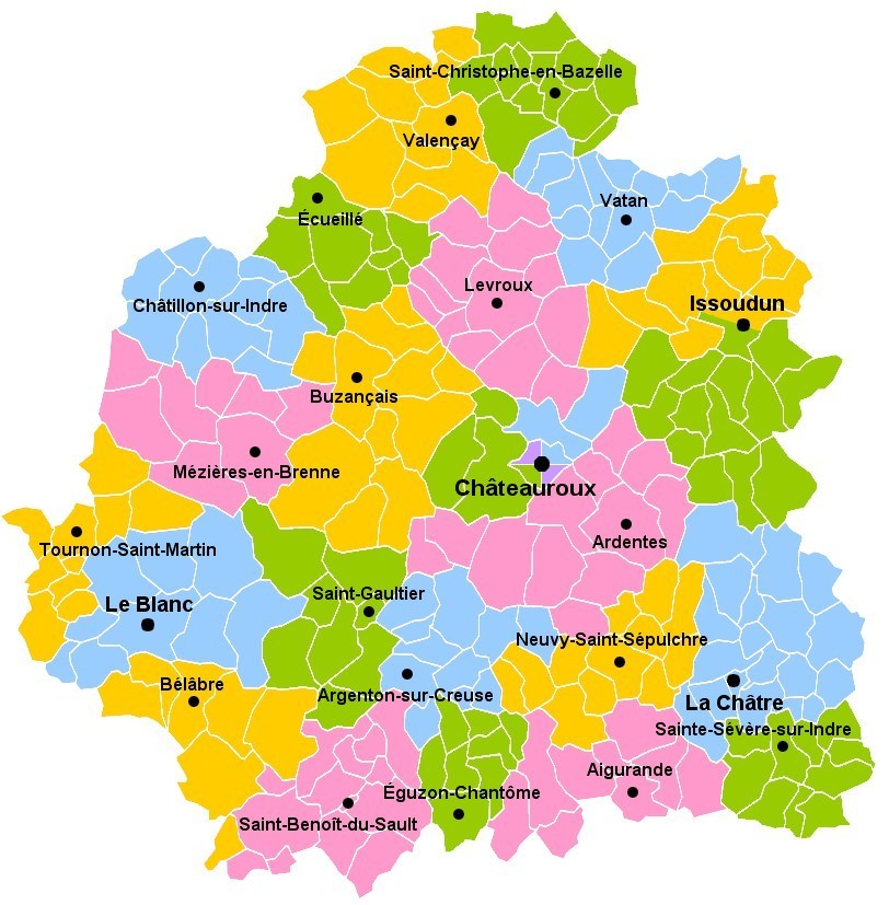 Carte des communes de l'Indre (36) : Les cantons de l'Indre avant 2015.